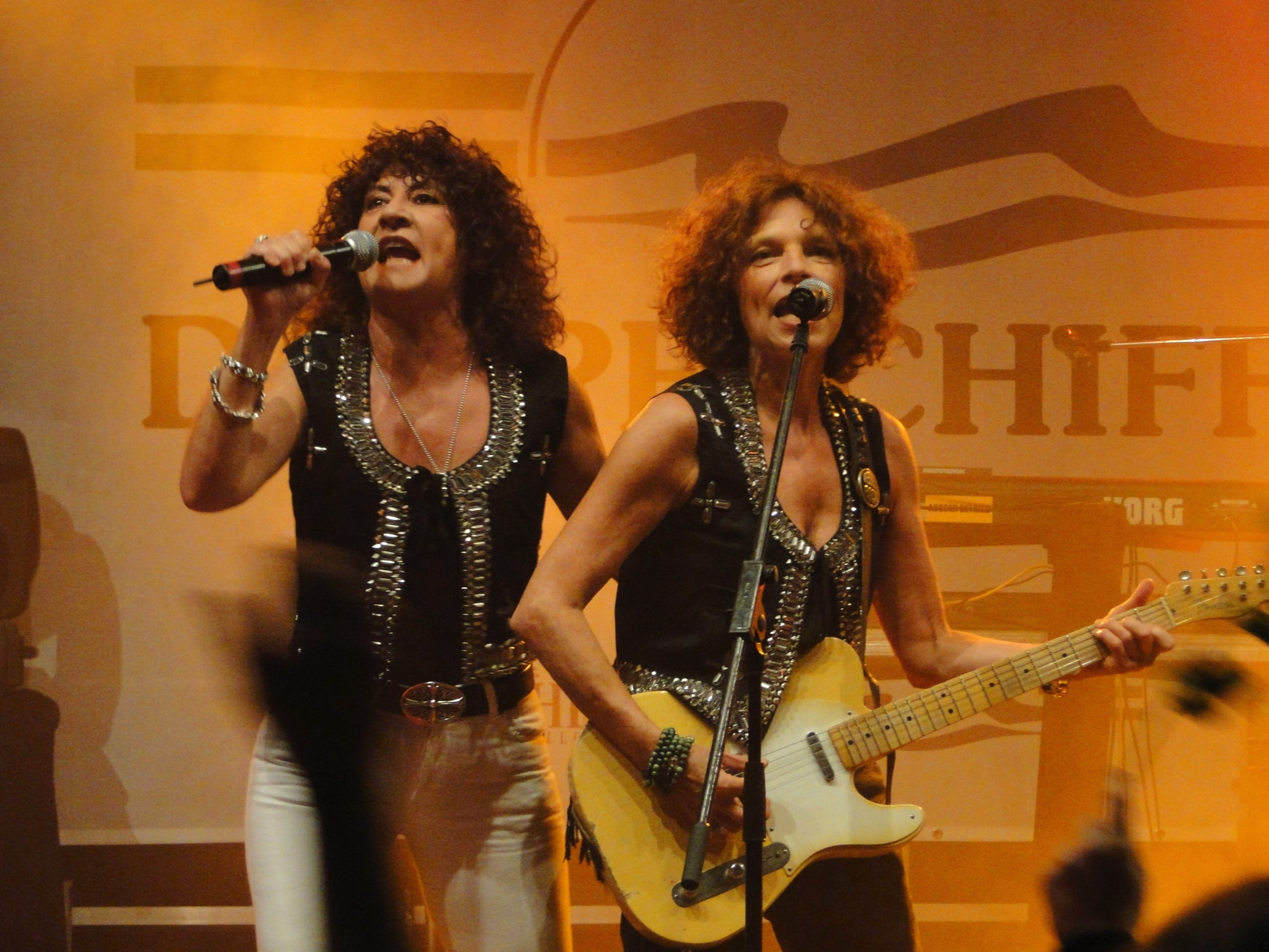 Die deutsche Band Cora bei einem Auftritt im August 2010